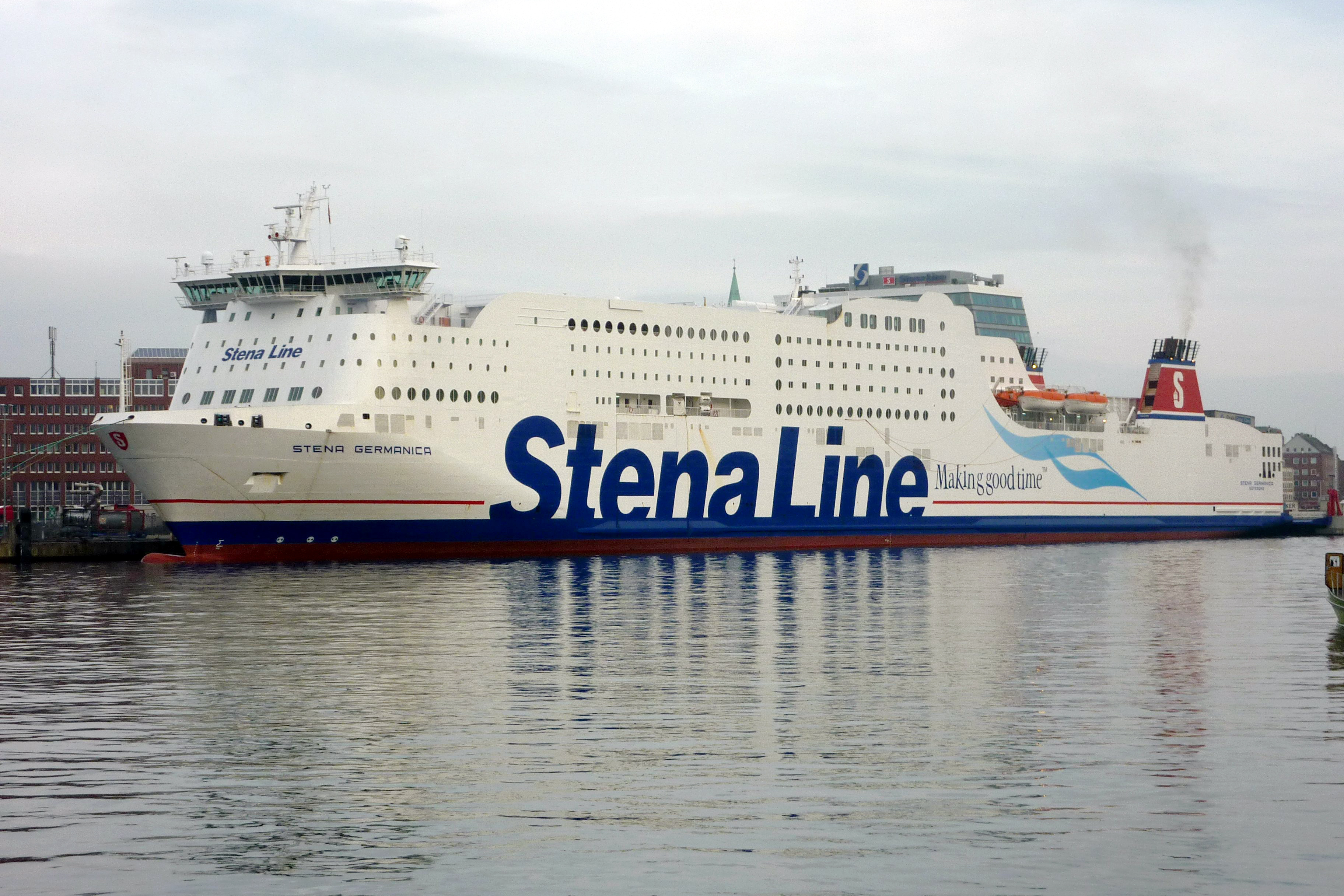 Stena Germanica står vid Swedenterminalen i Kiel